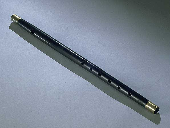 Fife-wooden, civil war era.jpeg From